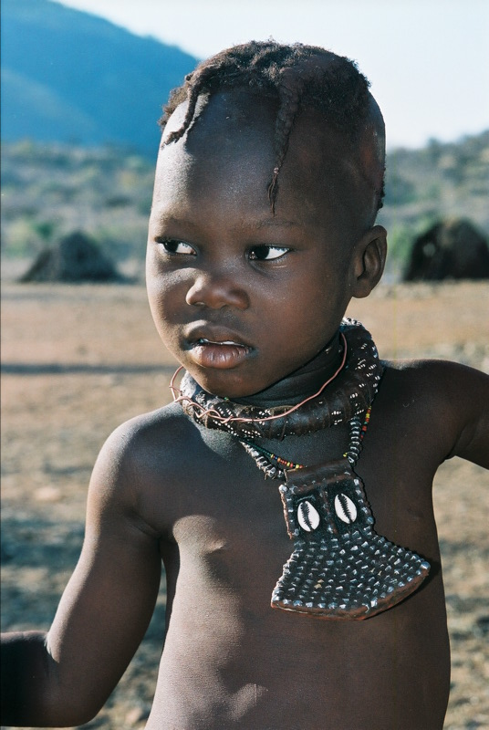 Himba child in Kaokoland, Namibia